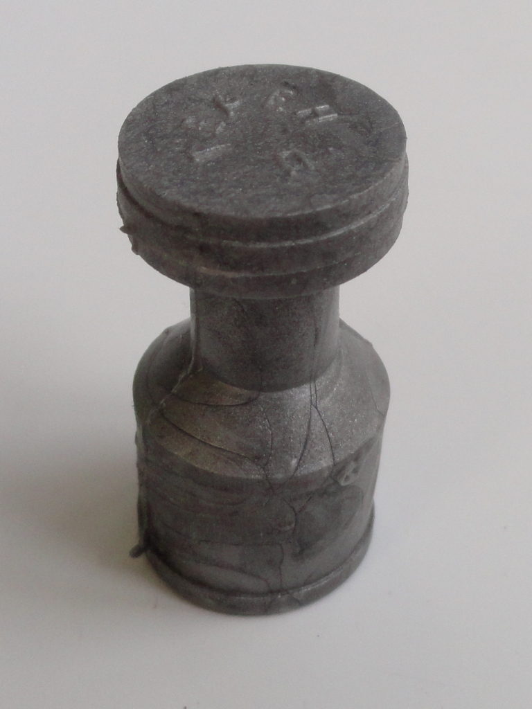 Резиновая пуля "Терен-12П" применявшаяся правоохранителями во время противодействия беспорядкам в г. Киеве в январе-феврале 2014 г.